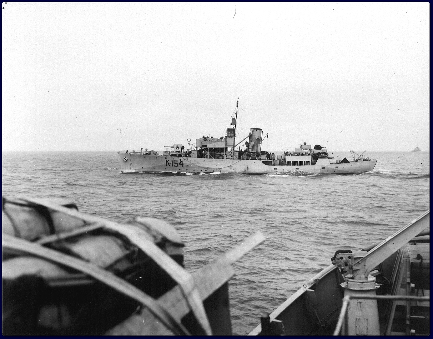 HMCS Camrose circa November 1943.